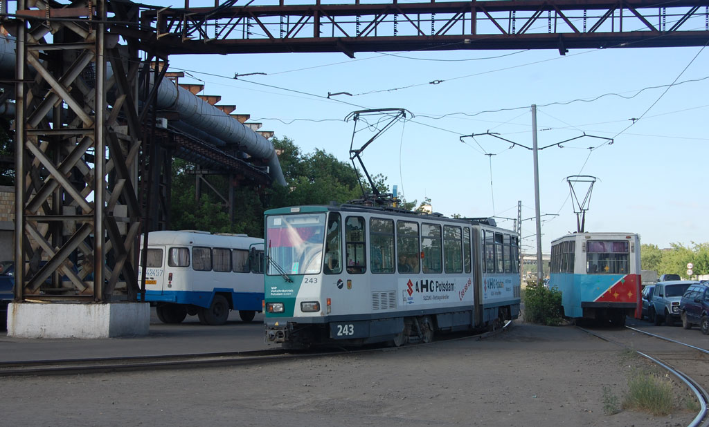 Темиртауский трамвай, трамвай темиртау, новые трамваи